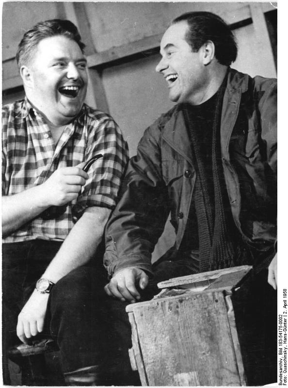 Szenenbild aus "Die Feststellung" Zentralbild Quasch. Quasch-Ho. 2.4.1958 Studiobühne des Theaters Stralsund spielt in der MTS Altenpleen. Die Studiobühne des Theaters der Werftstadt Stralsund machte vor einigen Tagen den ersten Einsatz und führte im Kulturhaus der MTS und LPG Altenpleen, Kreis Stralsund das Stück Die Feststellung von Helmut Baierl auf. Vor der Vorstellung besichtigten die Mitglieder des Ensembles die MTS. UBz: Szenenbild aus Die Feststellung. Siegfried Kilian (links) und Willi Schaper als Bauern.